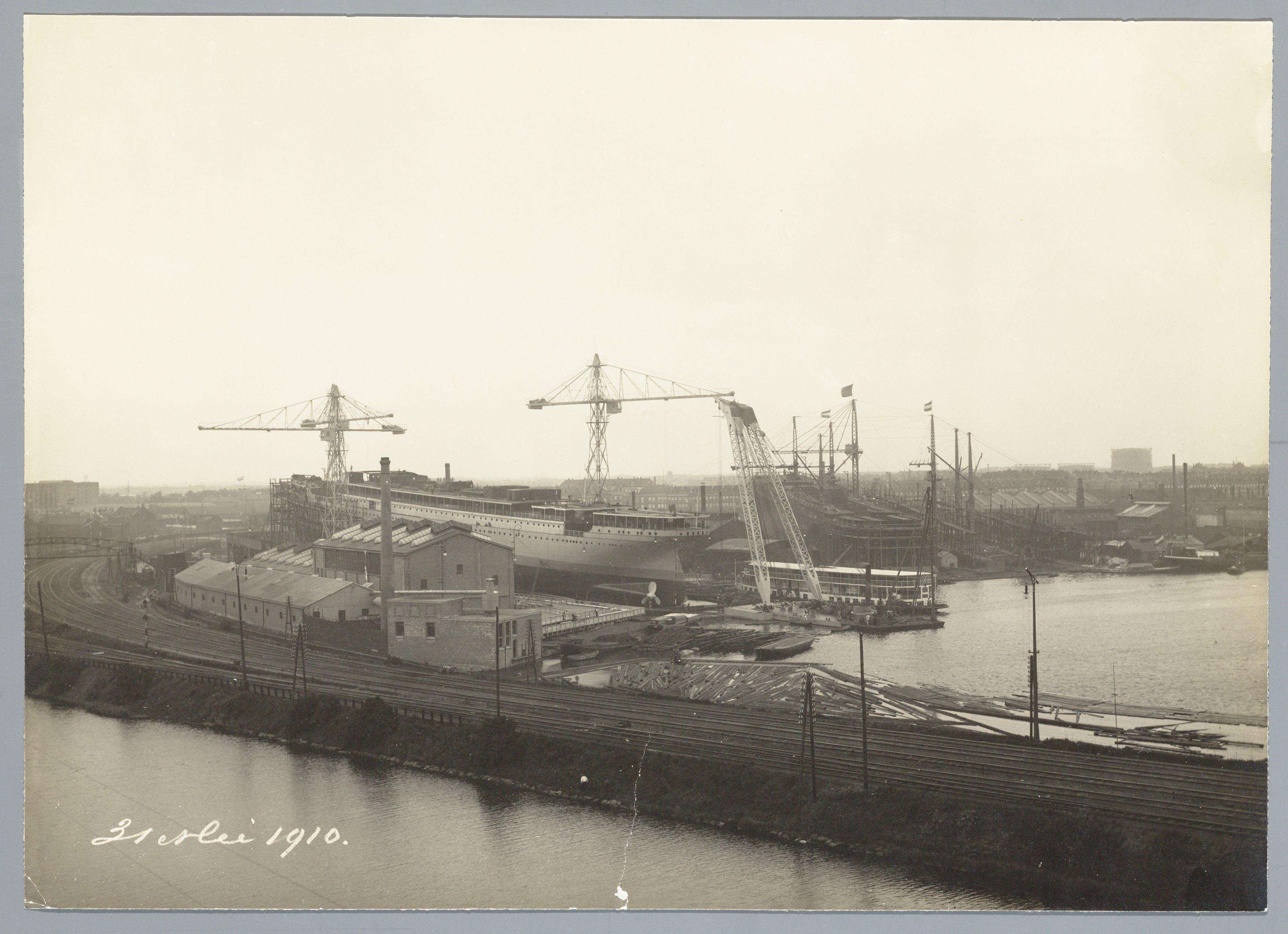 Beschrijving Gezicht op de werf van de Nederlandsche Scheepsbouw Maatschappij Op de helling het ss. Prinses Juliana, bouwnummer 105, gebouwd in opdracht van de Stoomvaart Maatschappij Nederland. In 1930 werd het schip verkocht aan de Koninklijke Nederlandsche Stoomboot Maatschappij en herdoopt met de naam Costa Rica. Op 12 april 1941 werd het afgevoerd. Bij een evacuatie van Engelse troepen uit Griekenland werd het door Duitse vliegtuigen gebombardeerd in de Middellandse Zee. Daarbij kwam het tot zinken. Documenttype foto Vervaardiger Oosterhuis, Gustaaf (1858-1938) Collectie Archief Nederlandse Dok- en Scheepsbouw Mij.: foto's Datering mei 1910 Inventarissen Afbeeldingsbestand 010179000064 Generated with Dememorixer